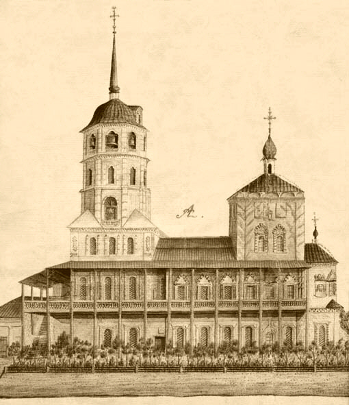 Иркутск. План Иркутской Спасской грекороссийской кафолической каменной церкви. Рис. И. Е. Кожевина. Фрагмент.